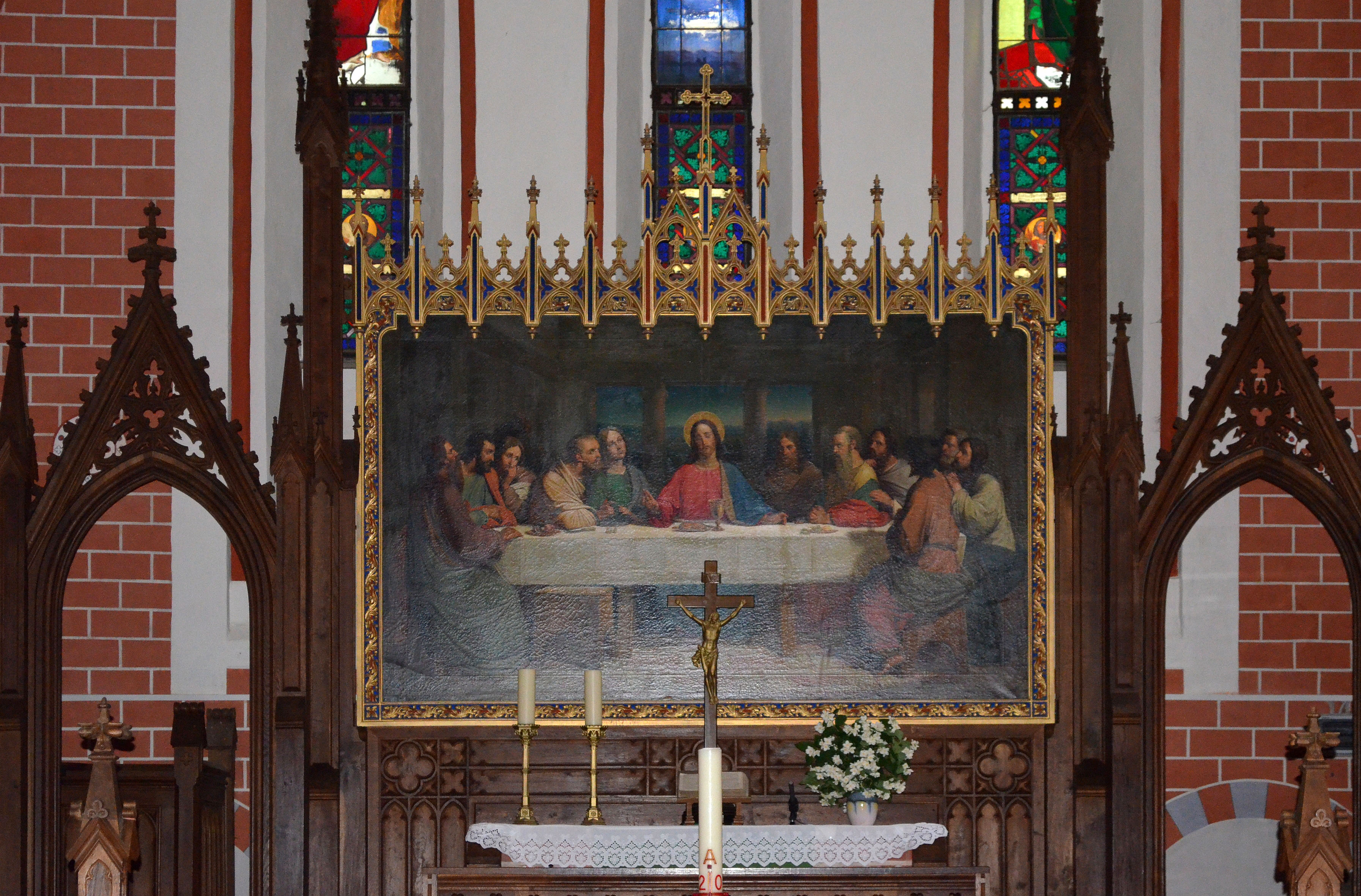 Röbel, Marienkirche, Altar 4